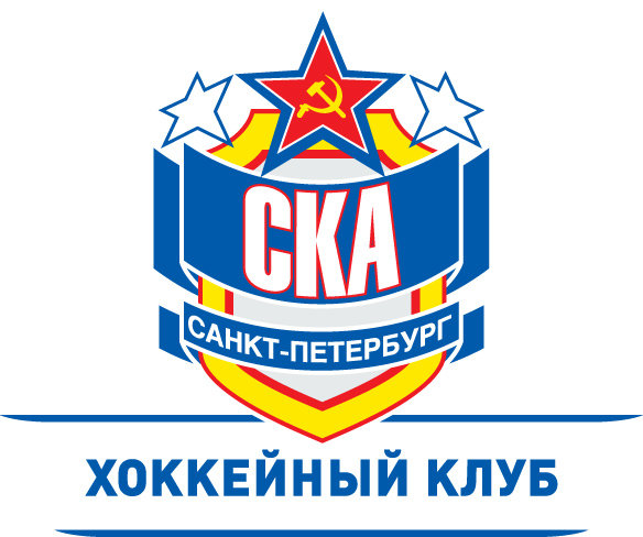 SKA Saint Petersburg. 2010 logo